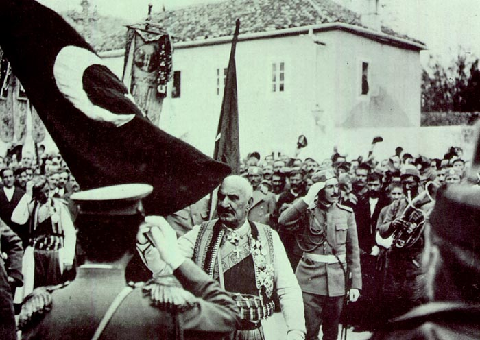 Predaja Otomanske zastave crnogorskom kralju Nikoli, u Skadru 1913.